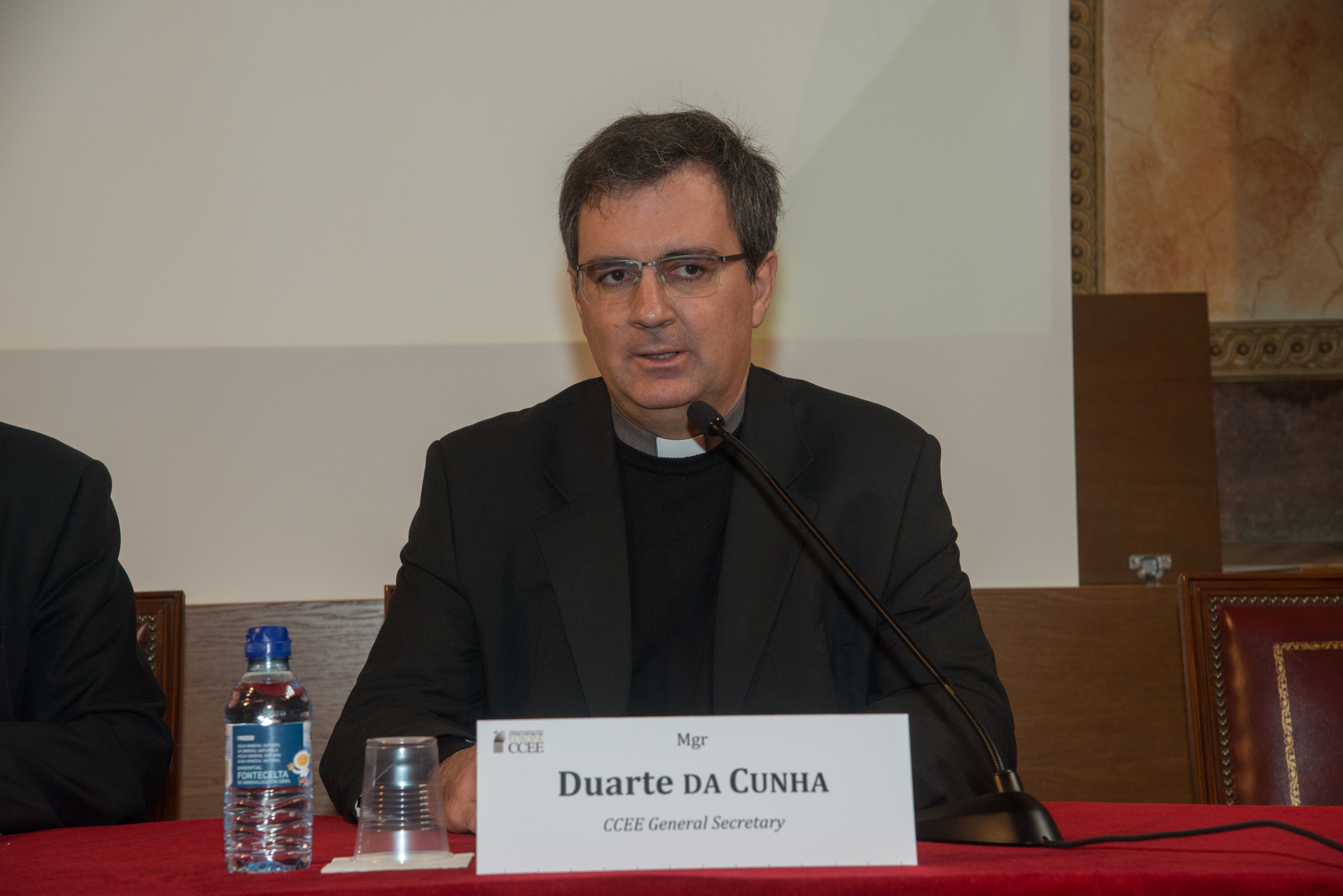 Duarte Da Cunha, Duarte Nuno Queiroz de Barros da Cunha, secretario general de la CCEE.